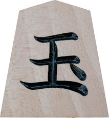 Pièce d'un jeu de Shogi: un roi "challenger". (Variante avec un seul caractère - kanji - représenté)